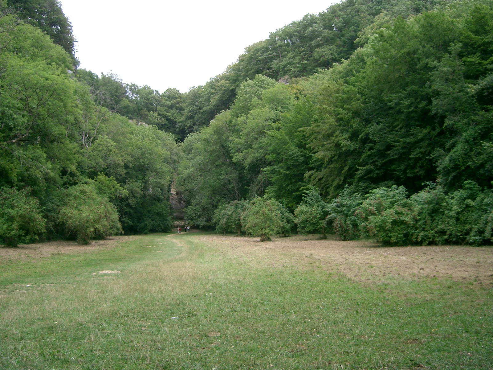 Nolay (21) cirque du Bout du monde